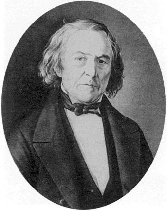 Раич, Семён Егорович. Фотография с портрета А. Кавелина (оригинал утрачен). 1855 год.